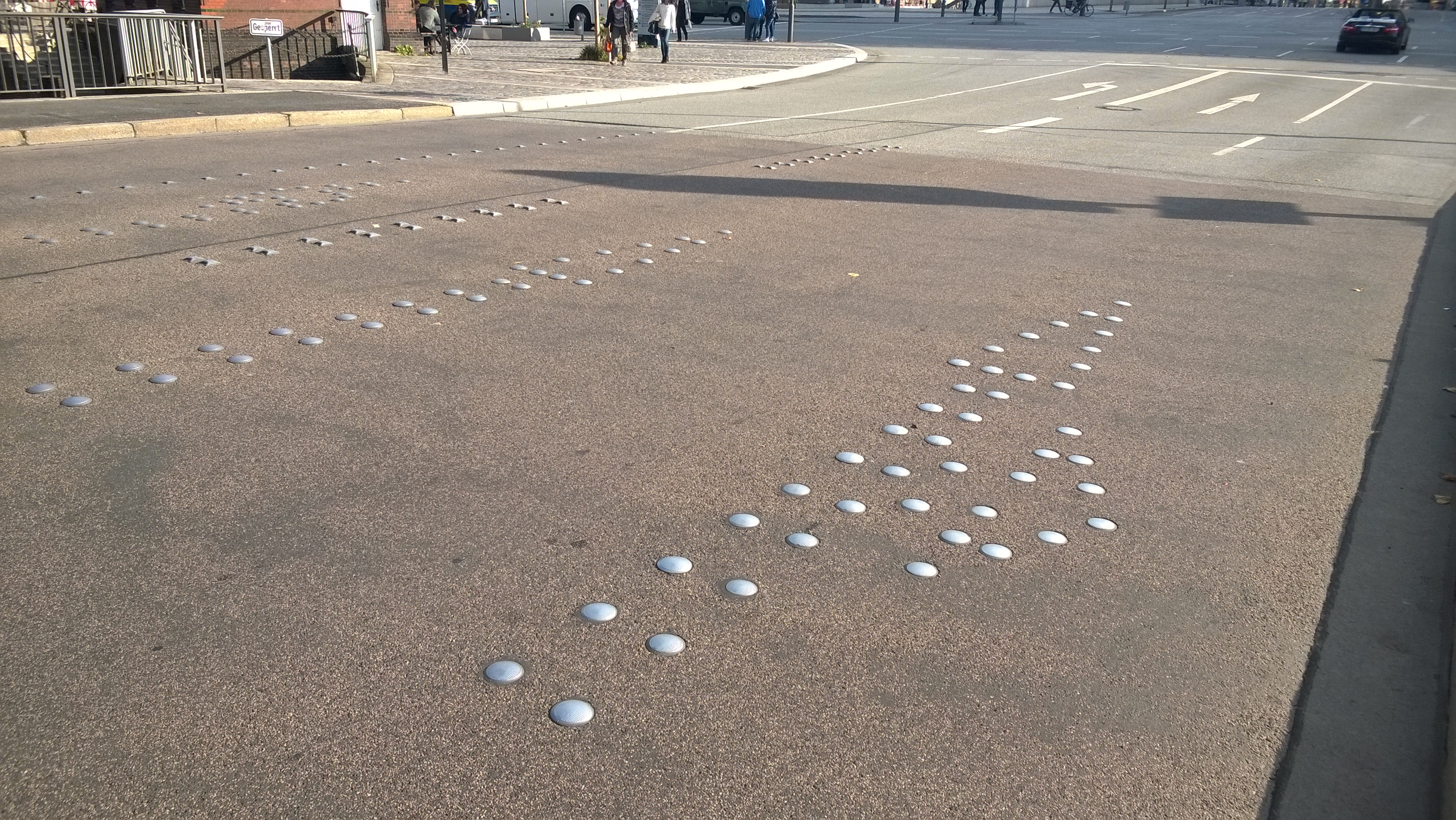 Fahrbahnmarkierung aus Metall in Hamburg